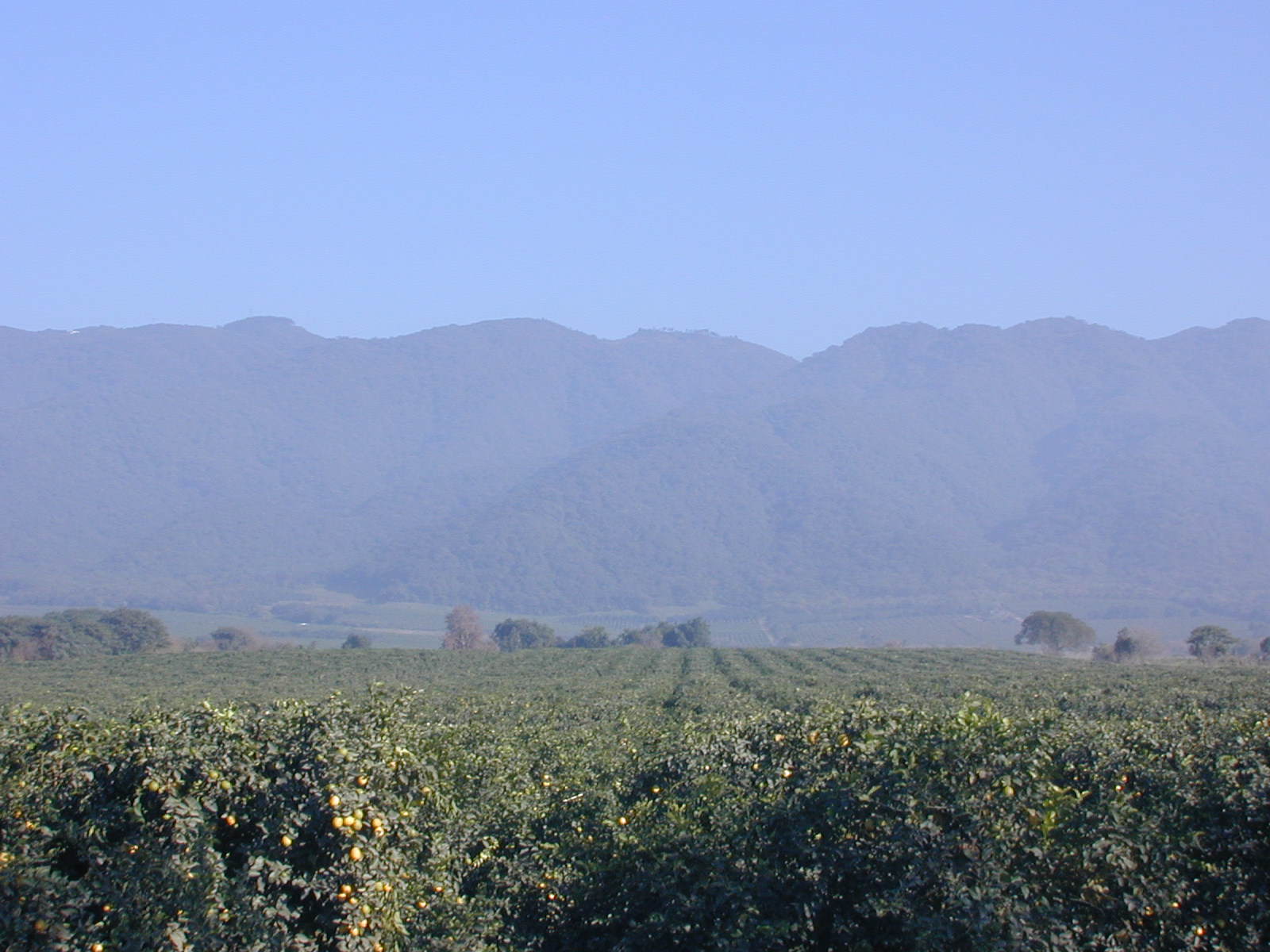 Yo, Aibdescalzo, saqué esta foto el 1 de Juliode 2006, en mi viaje a Tucumán.